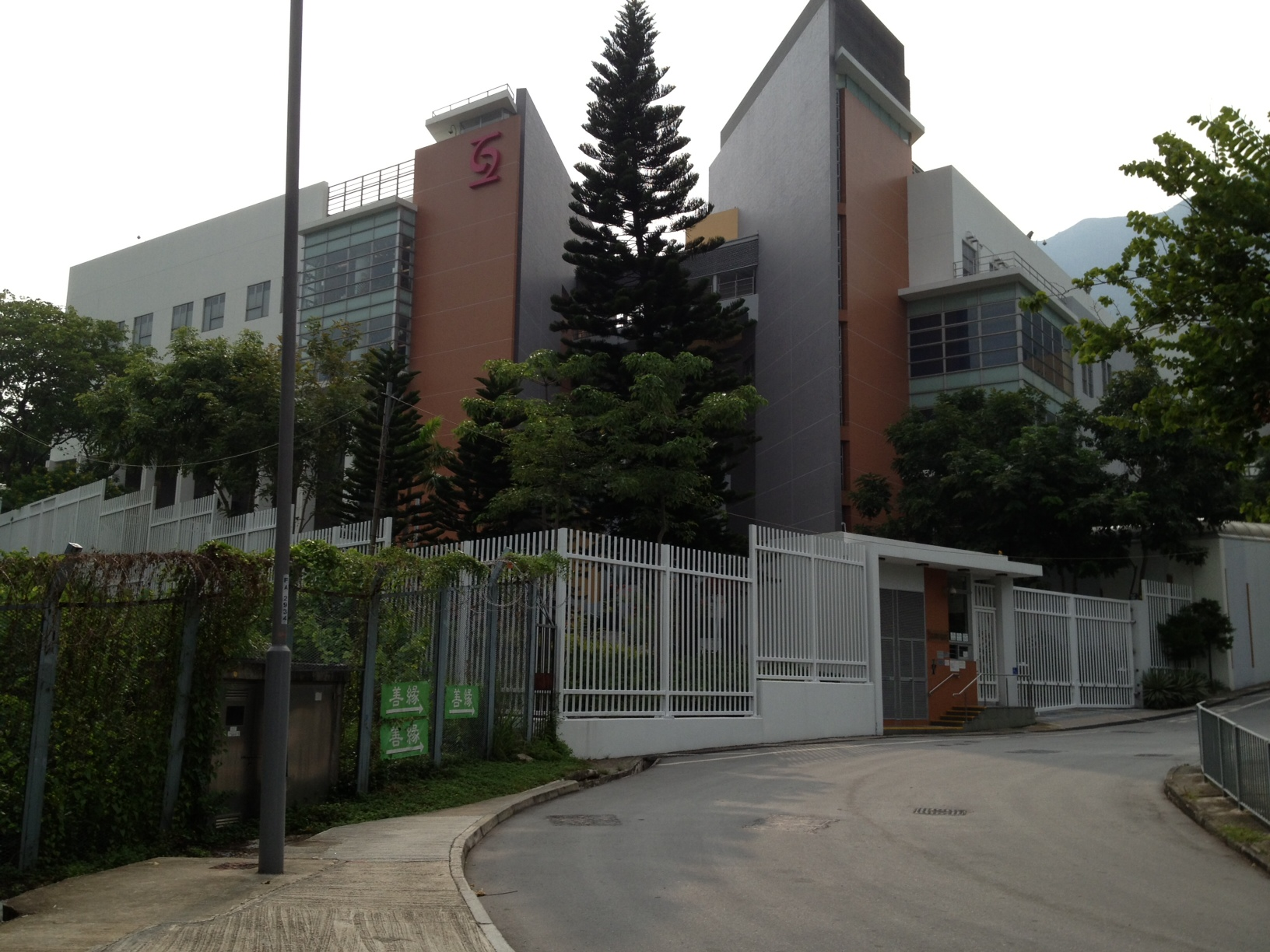 香港新界屯門散石灣北路3號屯門兒童及青少年院